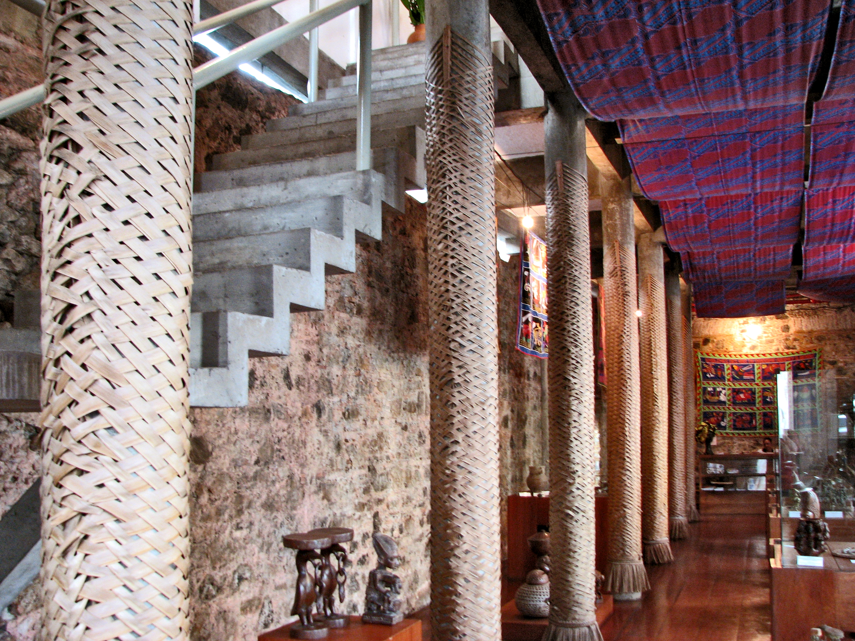 conjunto do benim pelourinho, salvador, bahia intervenção da arquiteta lina bo bardi